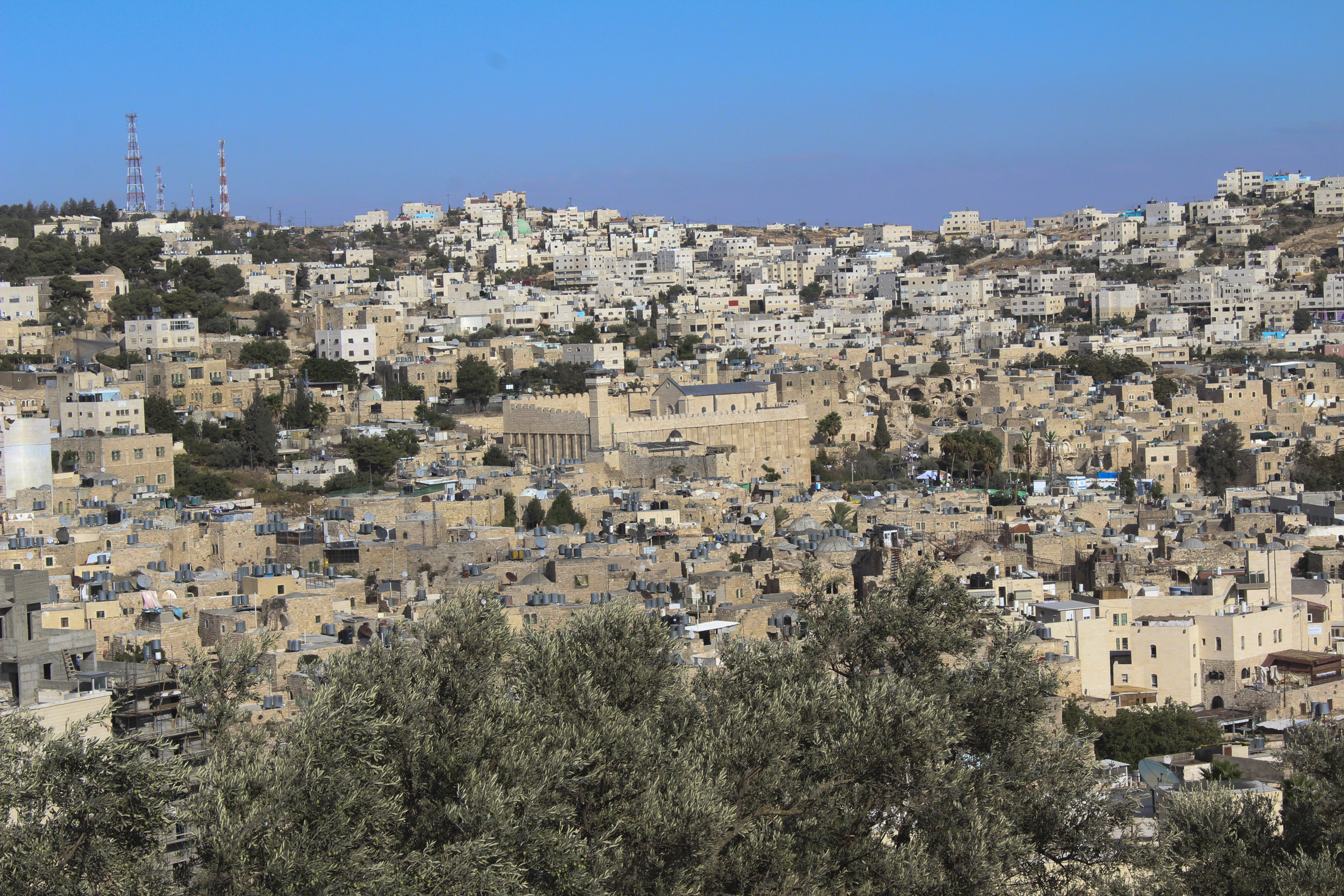 חברון 2013